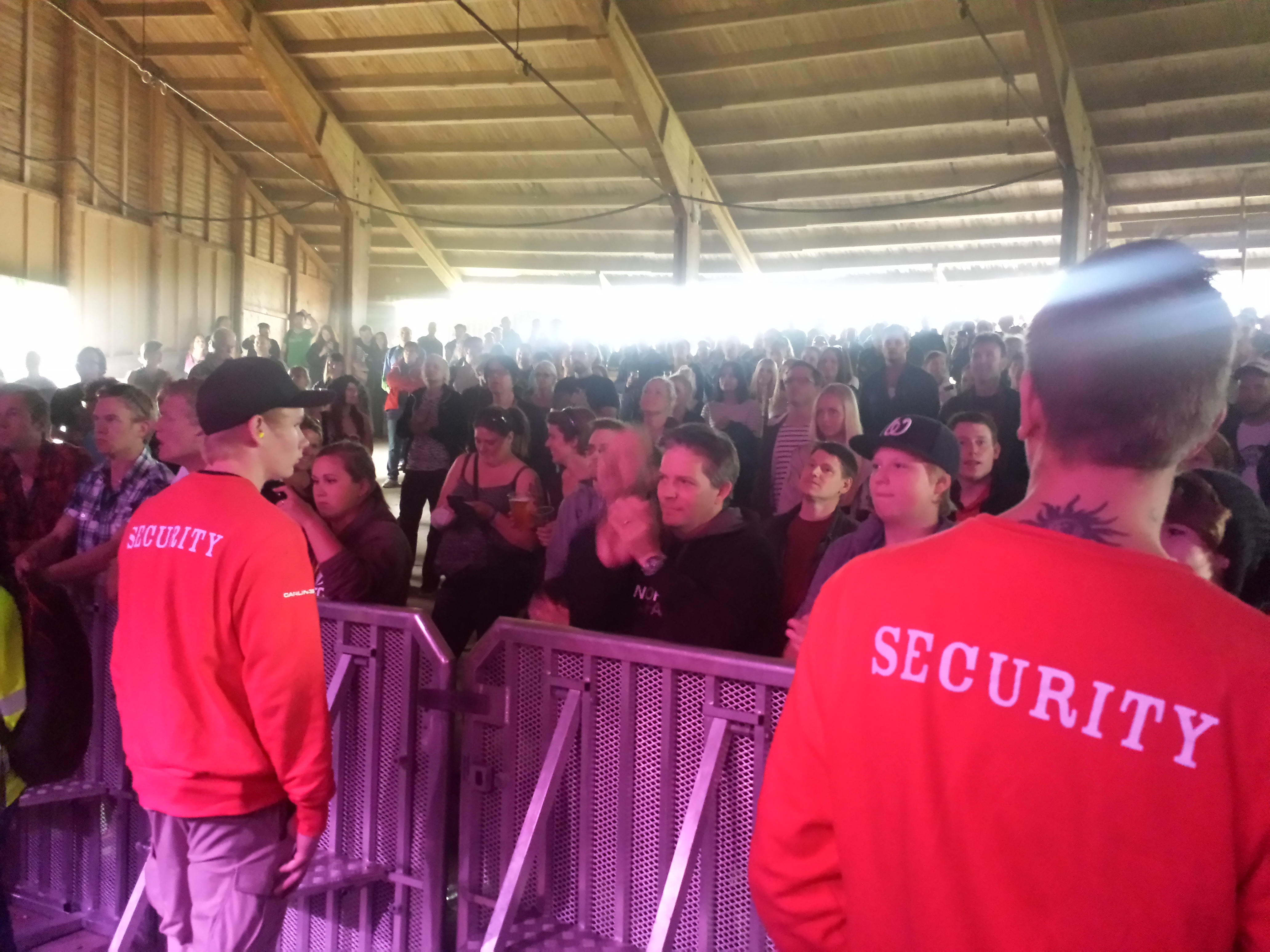 Lifvens spelar i Teaterladan under festivalen This Is Hultsfred.